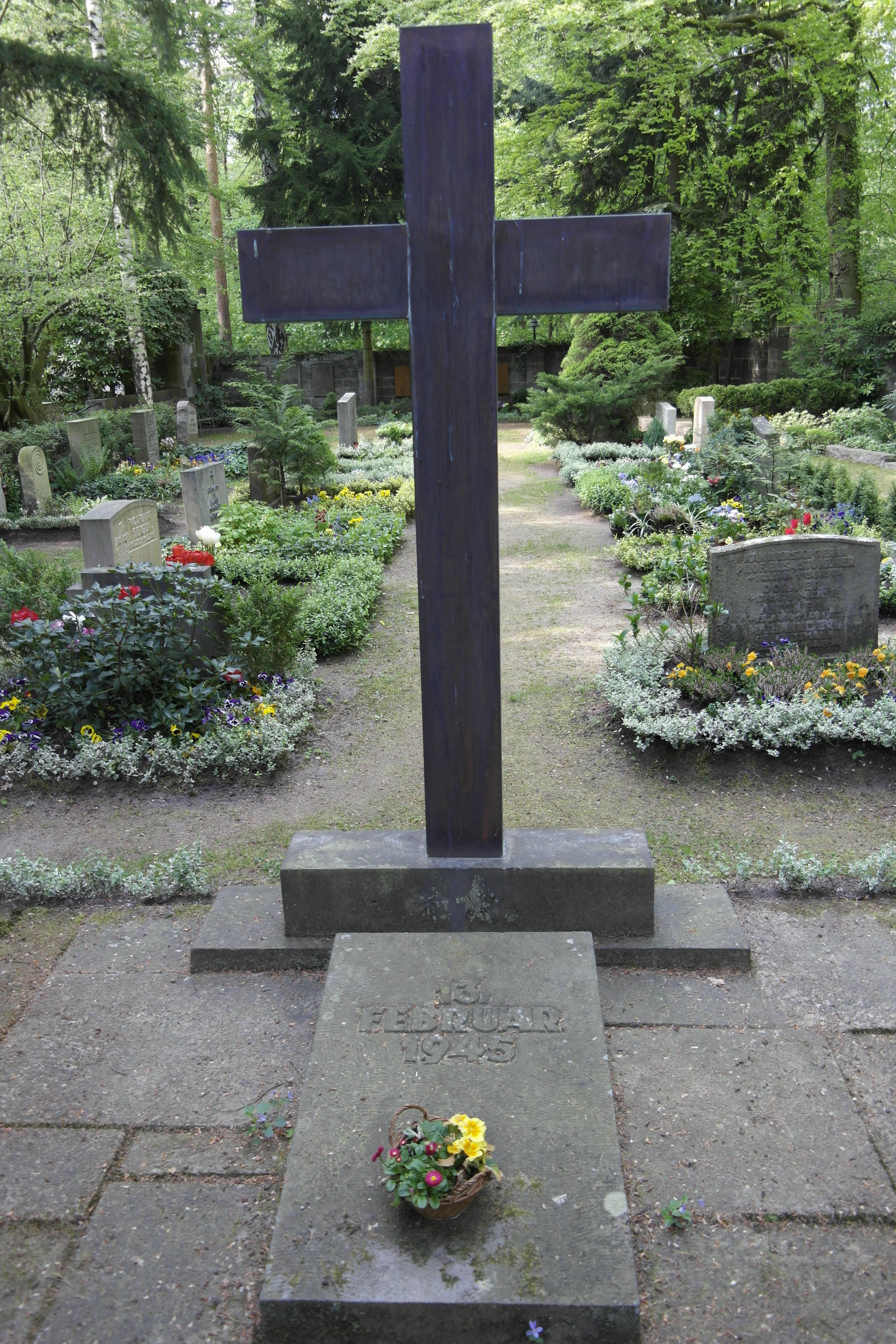 Dresden, Waldfriedhof Weißer Hirsch Gedenkstätte für die Opfer des 13. Februar 1945.